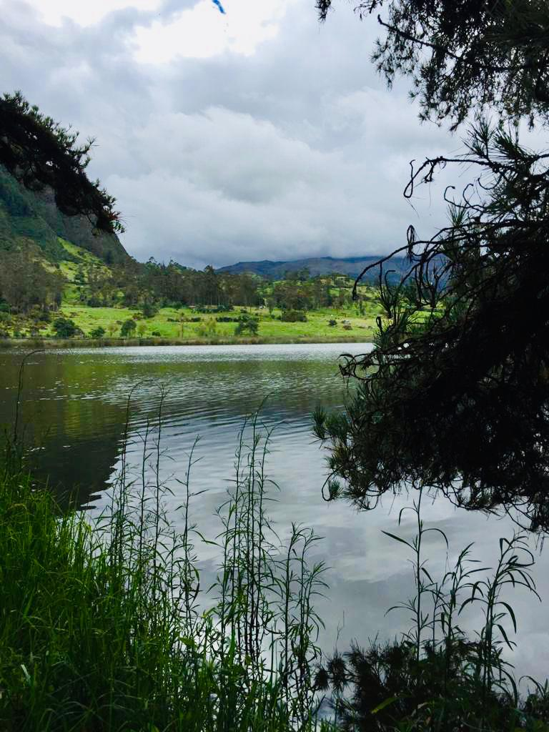 Fotografía de la Laguna de Busa ubicada en San Fernando, cantón del Azuay.